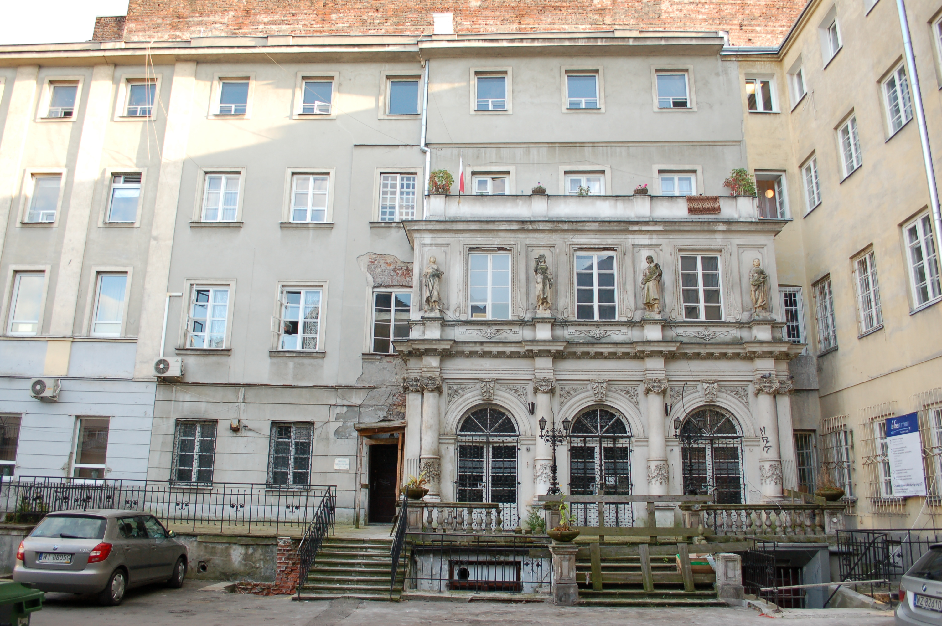 Warschau, Chmielna 5, Towarzystwo Przyjaciół Sztuk Pięknych (Warsaw)